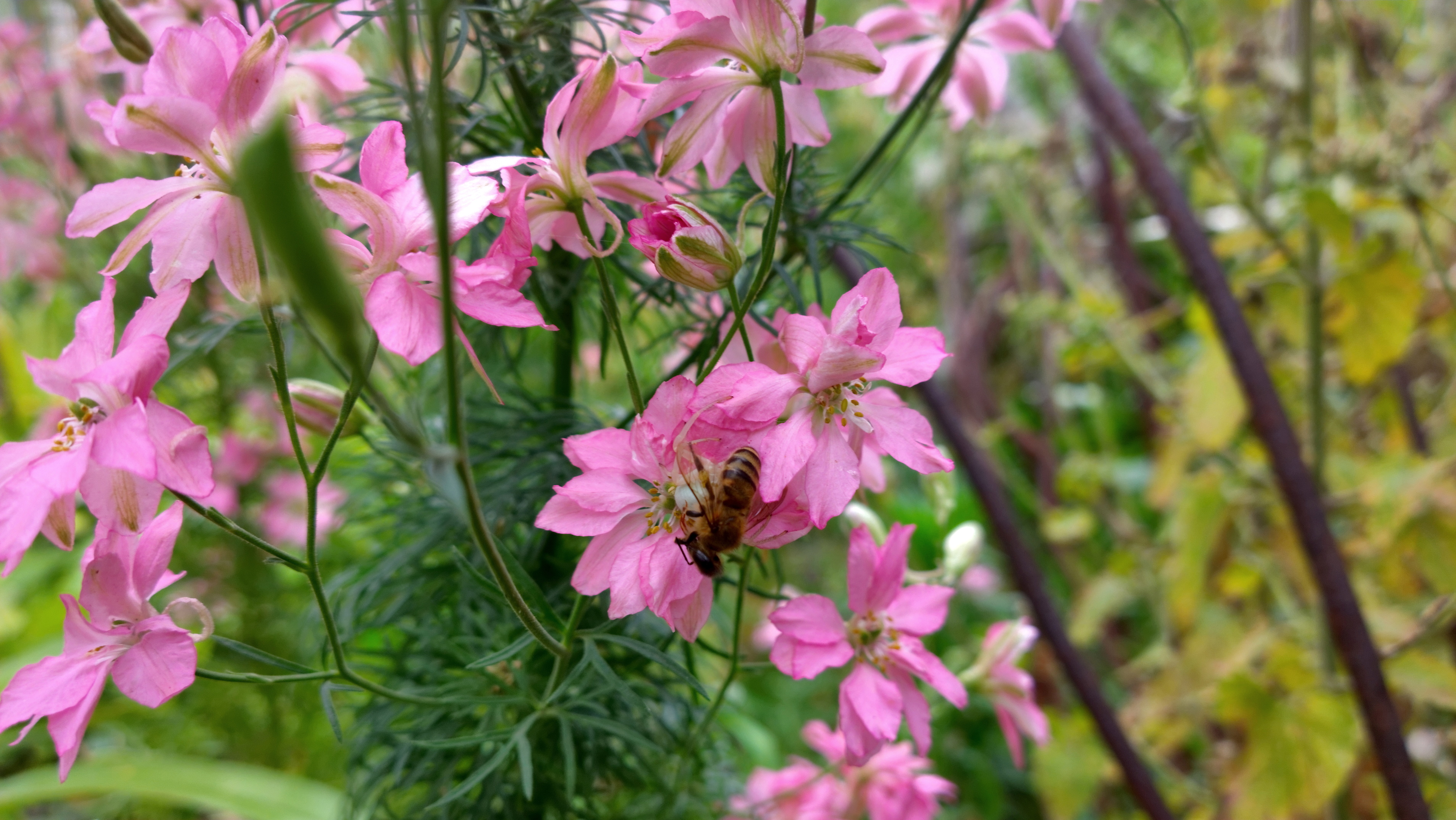 Flower Цветок